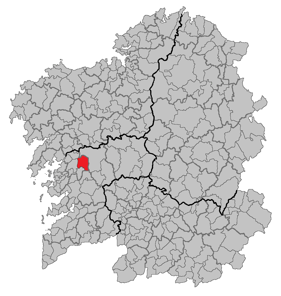 Mapa coa localización do concello de Cuntis.